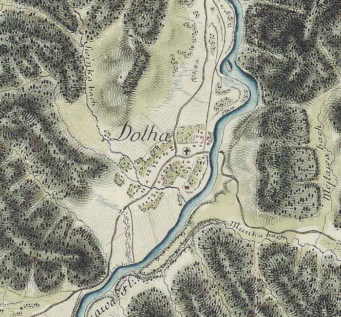 Карта с.Долгое